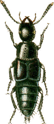 This file has been extracted from another file: Jacobs14.jpg